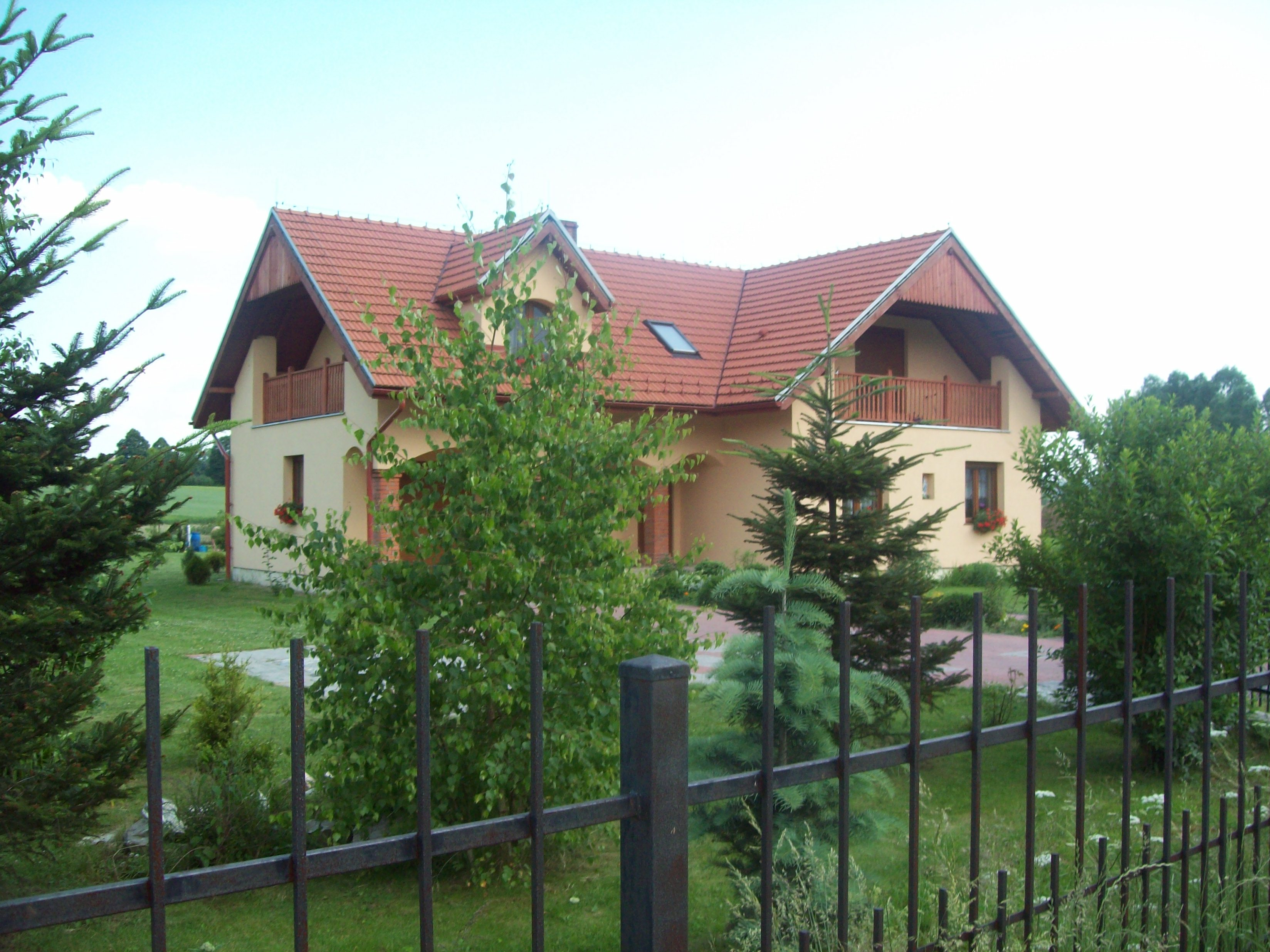 Nowe domy w Ławicy